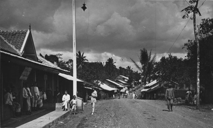 Foto. Straatgezicht, Pageralam